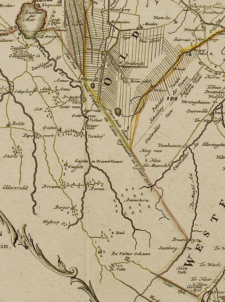 Detail van de"Kaart der provintie van Groningen en Ommelanden: mitsgaders de Heerlijkheid Westerwolde"